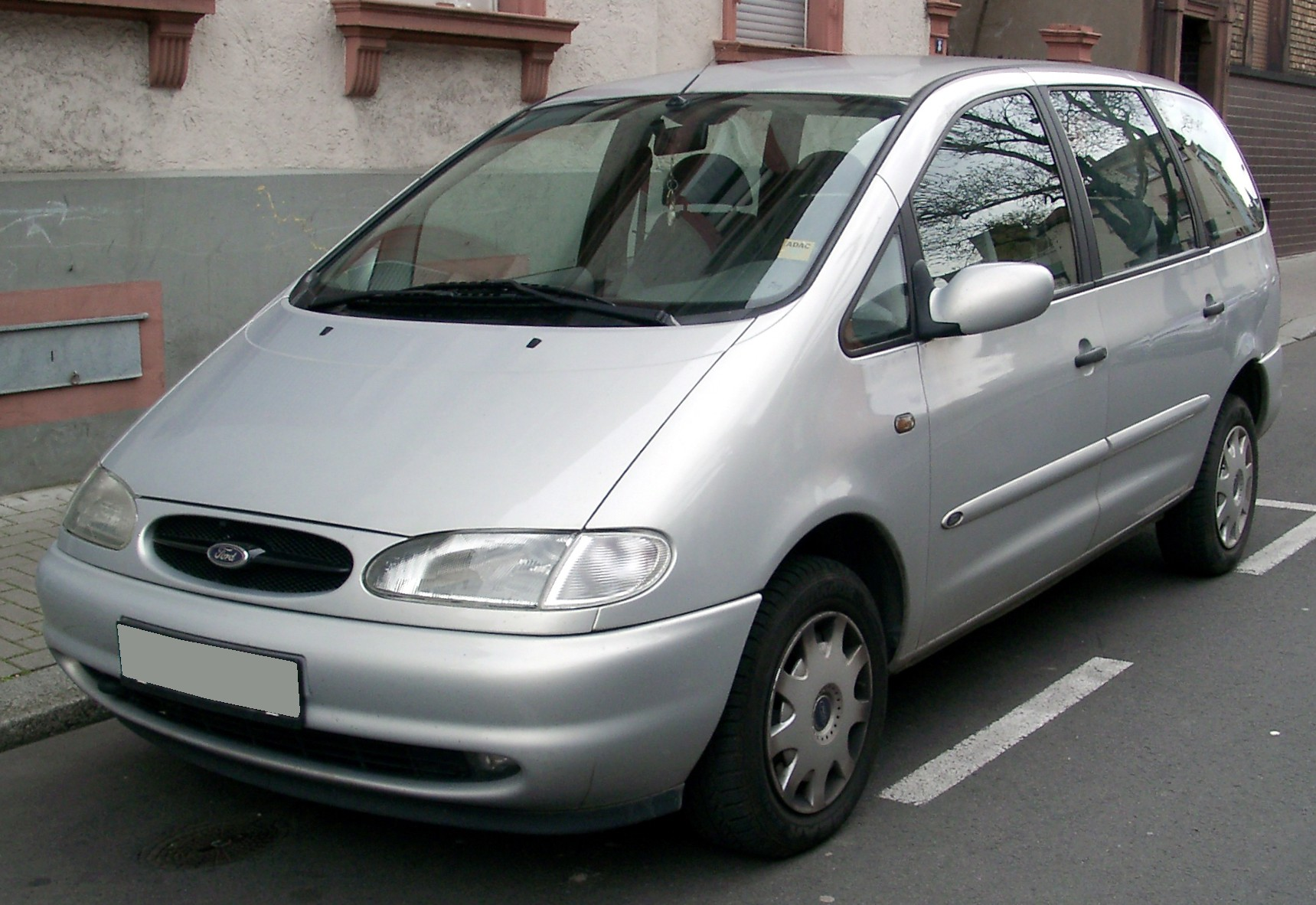 Ford Galaxy, 1. Generation